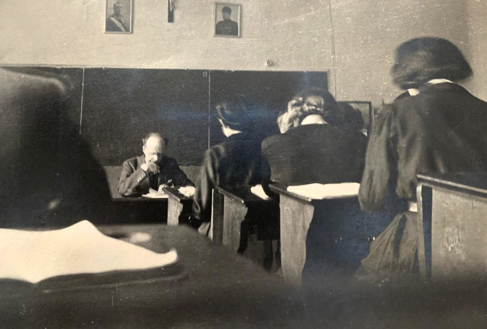 Carlo Curto durante una delle sue lezioni in aula, anni 30